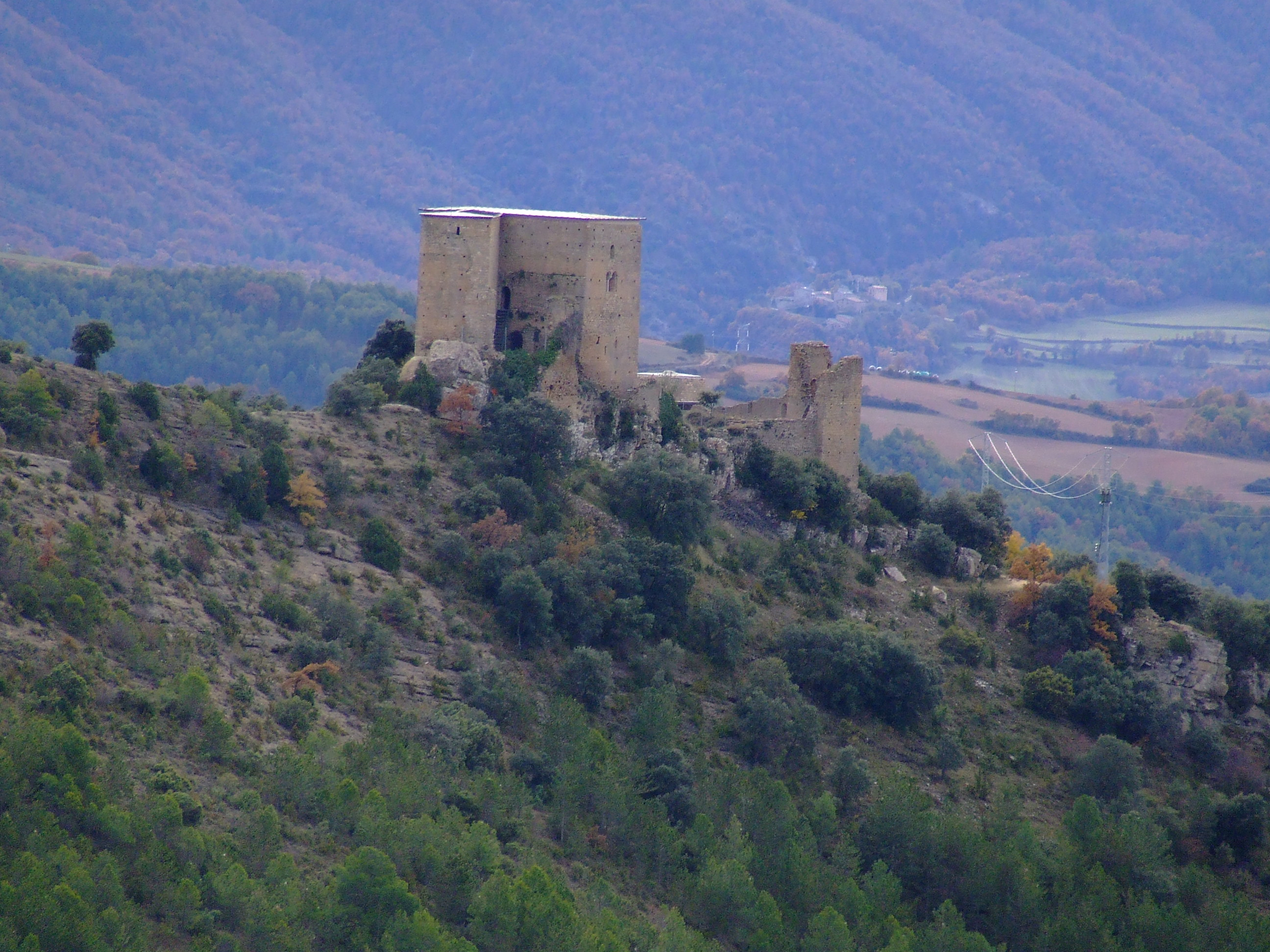 El castell de Llordà des del nord-oest (Isona, Isona i Conca Dellà, Pallars Jussà)